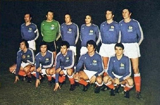 Équipe de France olympique de football en 1976, 'Montreal 76', Panini figurina.